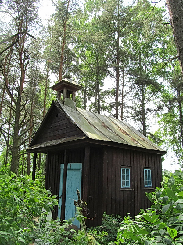 Масілавічы. Капліца на могілках